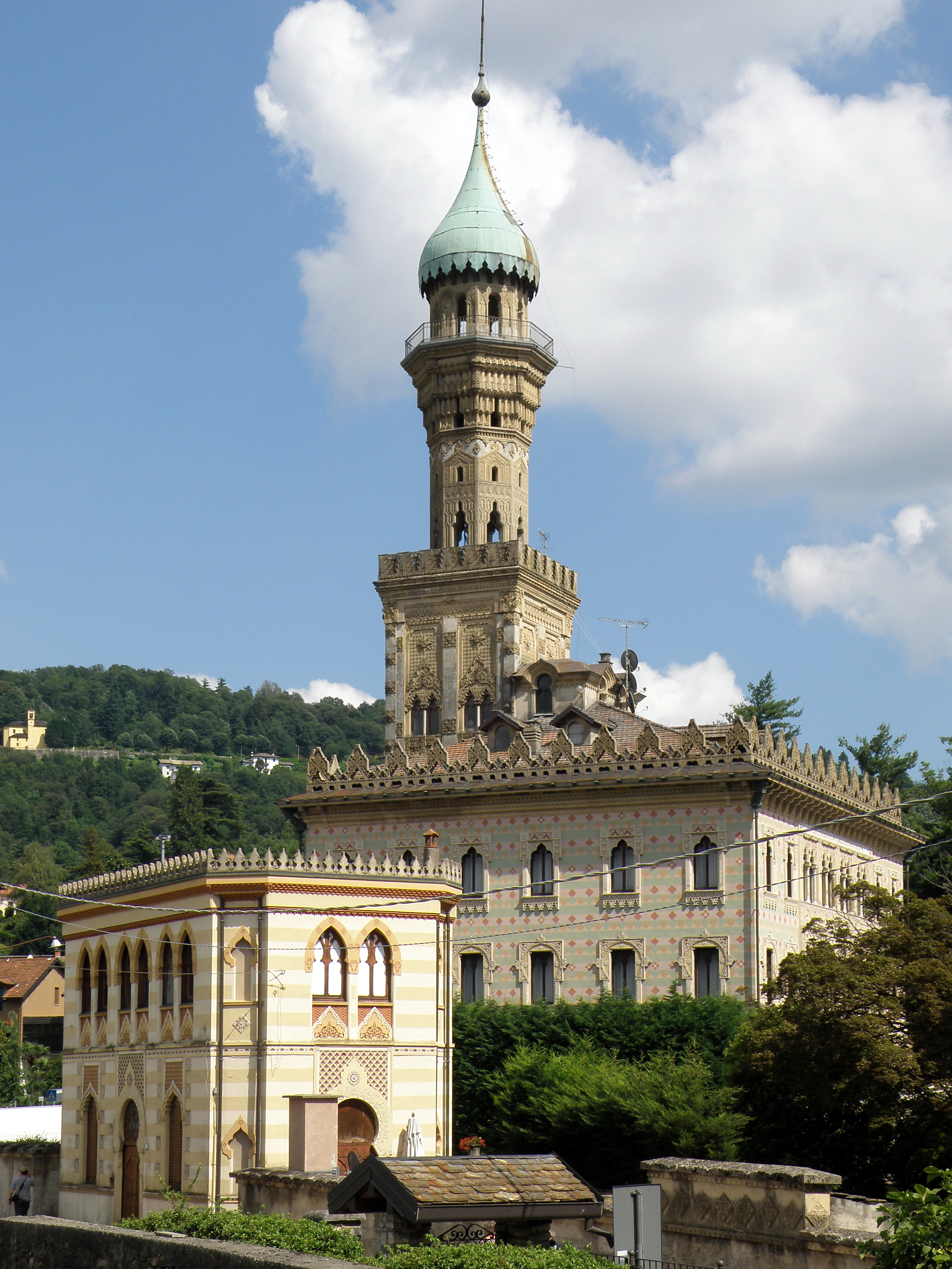 Orta San Giulio (prov. de Novare, région Piémont). Villa Crespi, fantaisie néo-mauresque située à l'entrée de la presqu'île d'Orta.